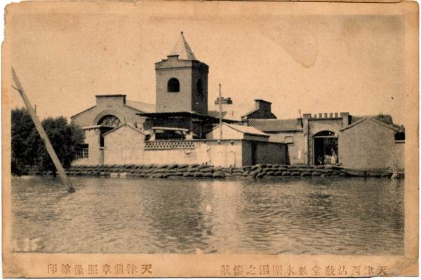 中文（中国大陆）: 该图片展现了西沽教堂于1917年大洪水围困的惨状。